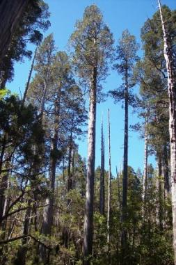 Alerces (Fitzroya cupressoides) en camino a Abtao, Parque Nacional Chiloé (Chile)